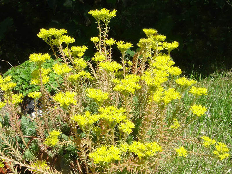 Sedum reflexum